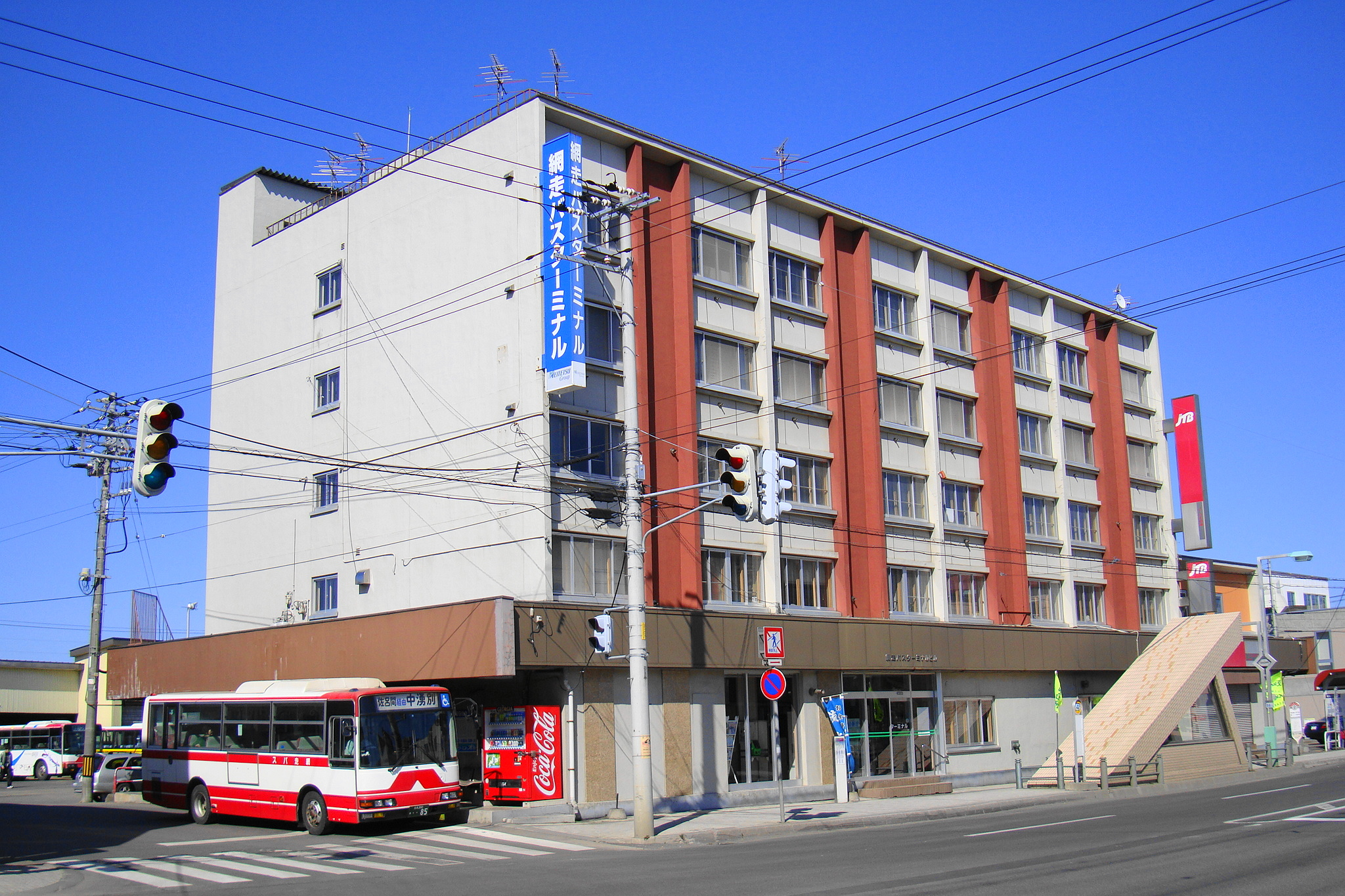 Abashiri Bus terminal